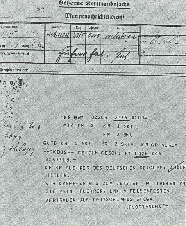 Funknachricht Lütjens an Hitler